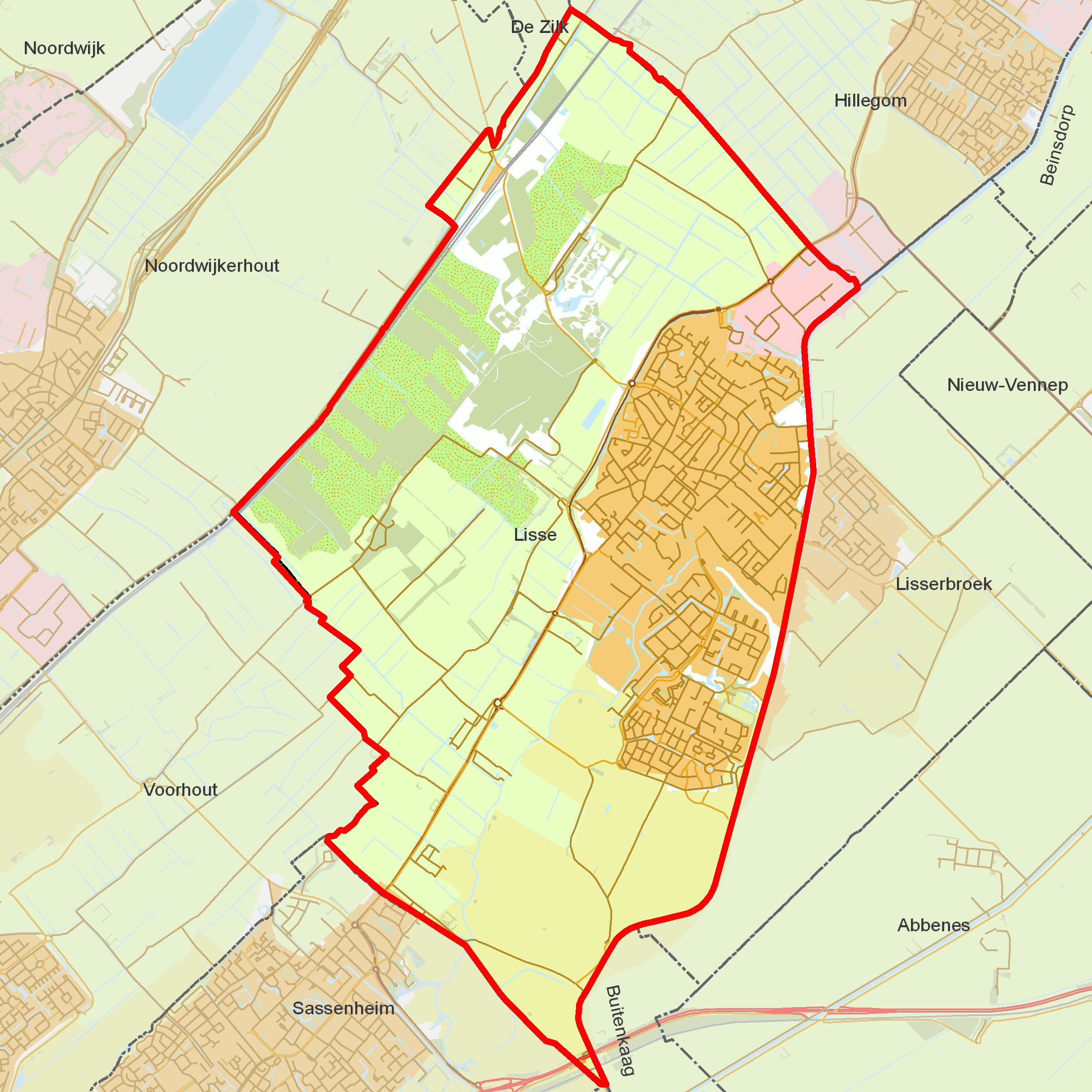 BAG woonplaatsen - Gemeente Lisse.png